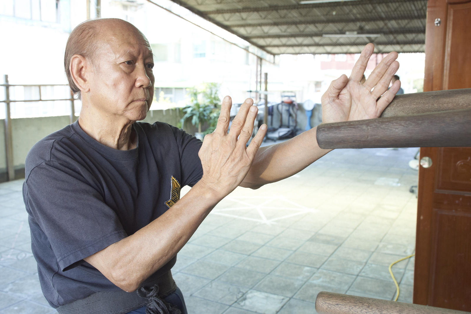 盧文錦